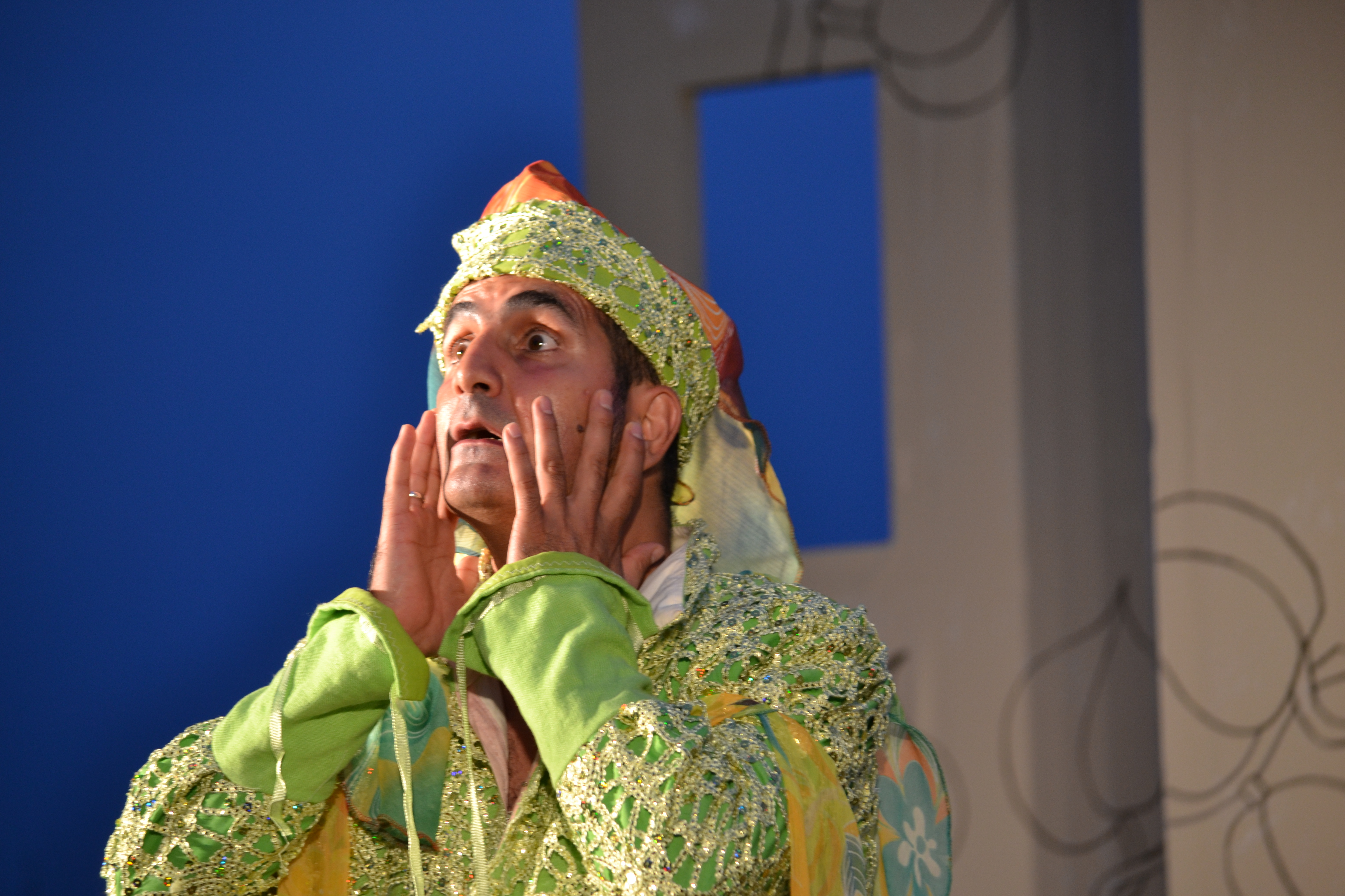 Tuncay Gary als Oberon in Shakespeares "Sommernachtstraum" 06.07.2012 auf der Freilichtbühne in Petzow